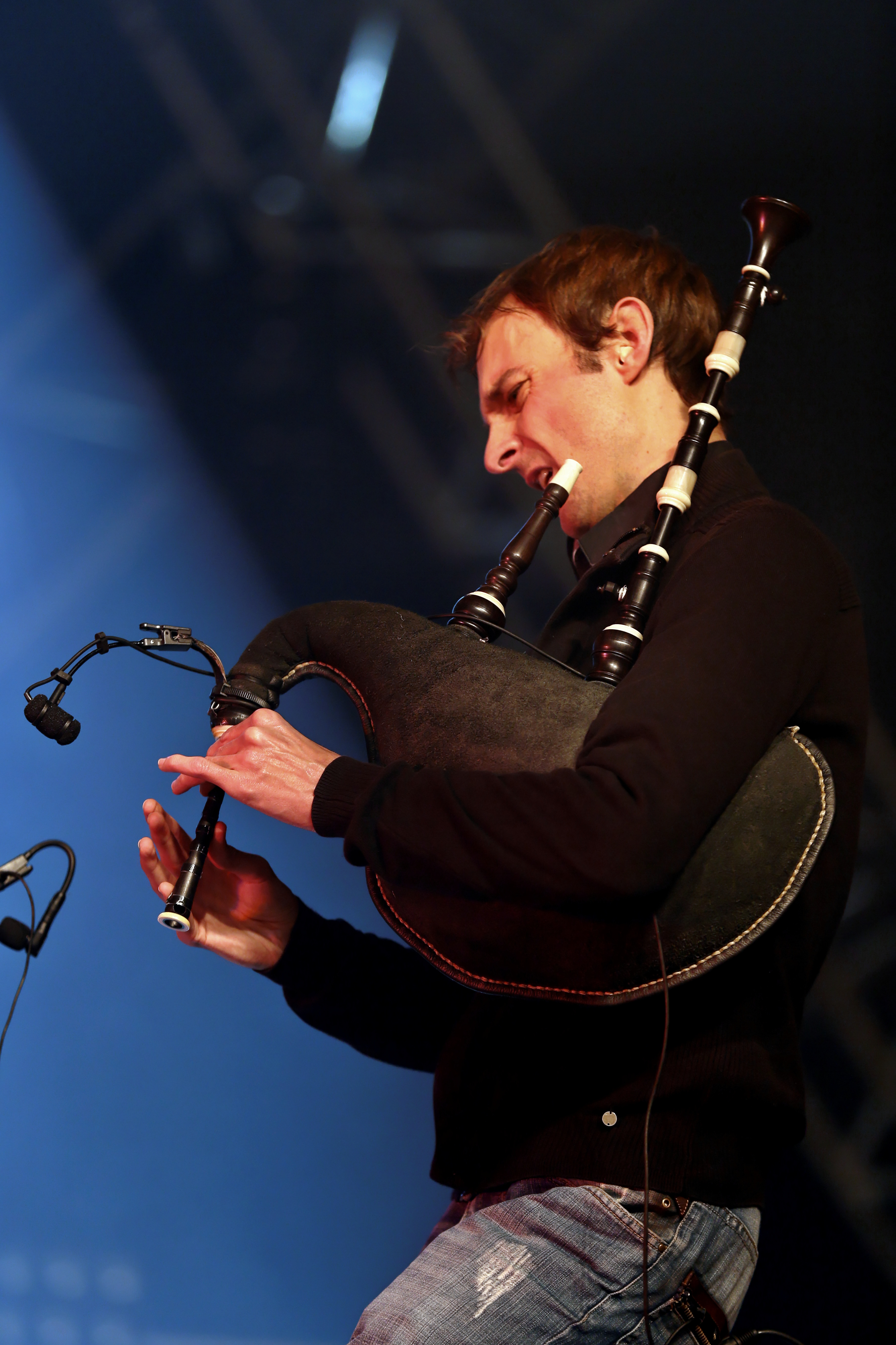 Startijenn en fest-noz lors du festival Yaouank le 21 novembre 2015 au Parc des Expositions de Rennes.